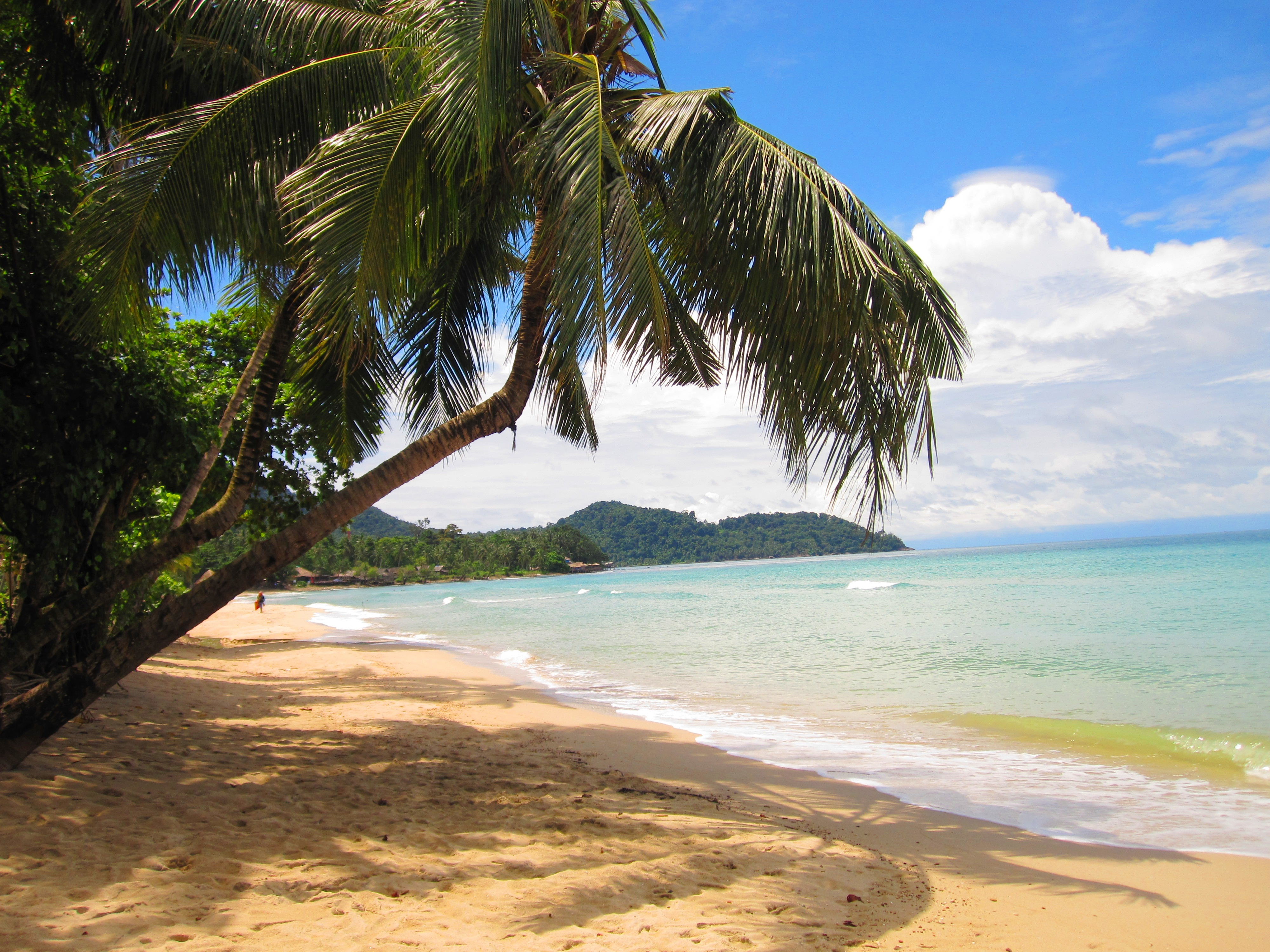 Пляж Лонли Бич